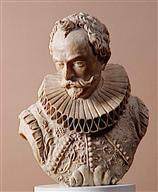 Henry d'Oultreman